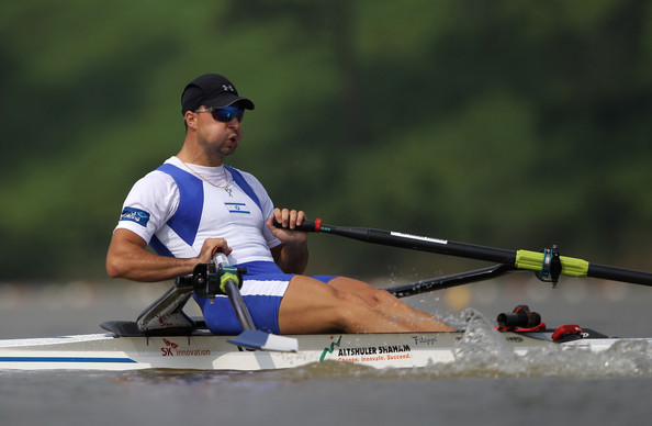 דני פרידמן